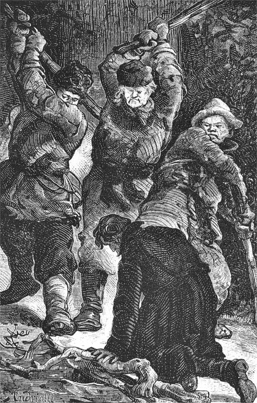 Michał Elwiro Andriolli